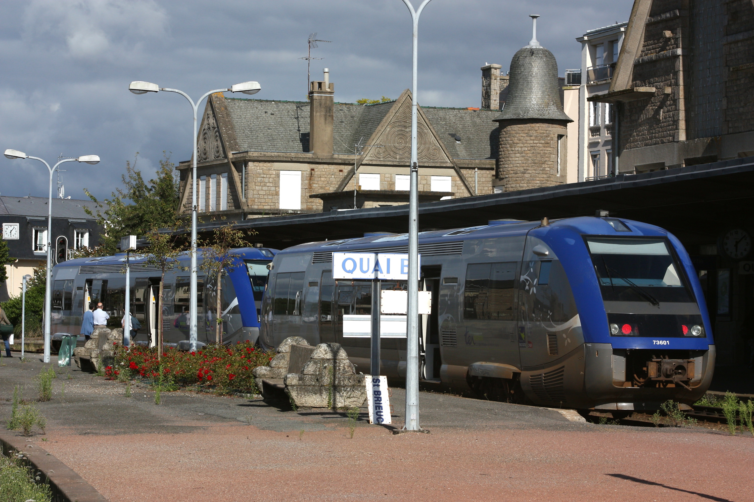 Une UM d'AXTER, dont l'X 73601 en gare de Dinan, entre les TER n°54139 et n°54164